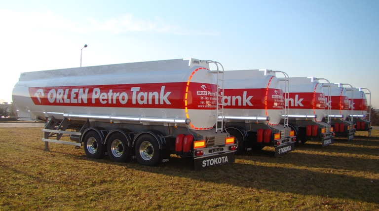 Полуприцеп-цистерна для транспортировки светлых нефтепродуктов